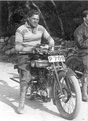 Magnus Nyström på en Norton racer. Fotot är taget innan starten på 1927 års Onsalalopp. På denna Norton hade han tidigare på våren slagit nytt hastighetsrekord i klass c 500cc. fotografen är okänd